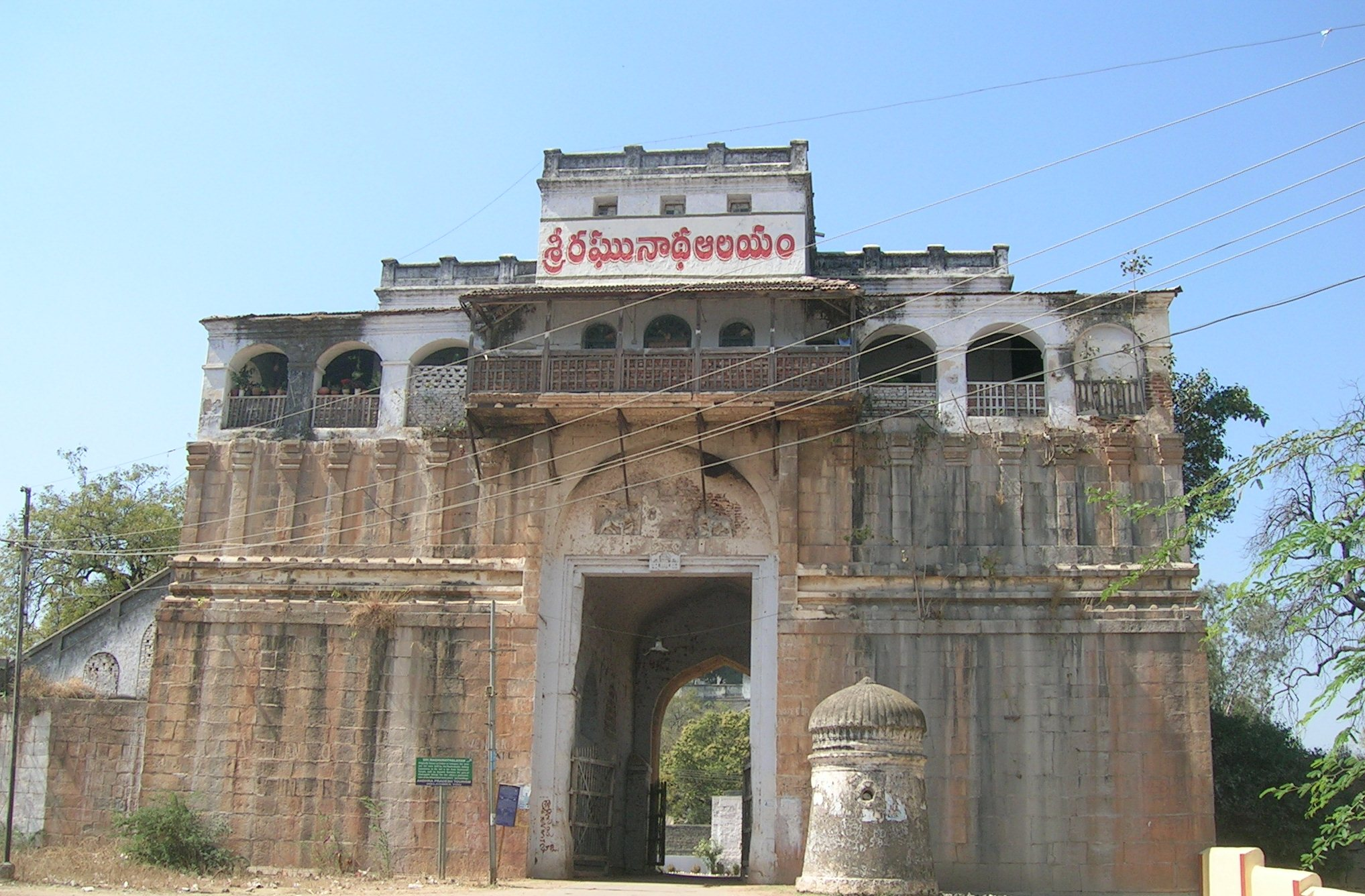 Entrance gate to Fort(Quilla),Nizamabad